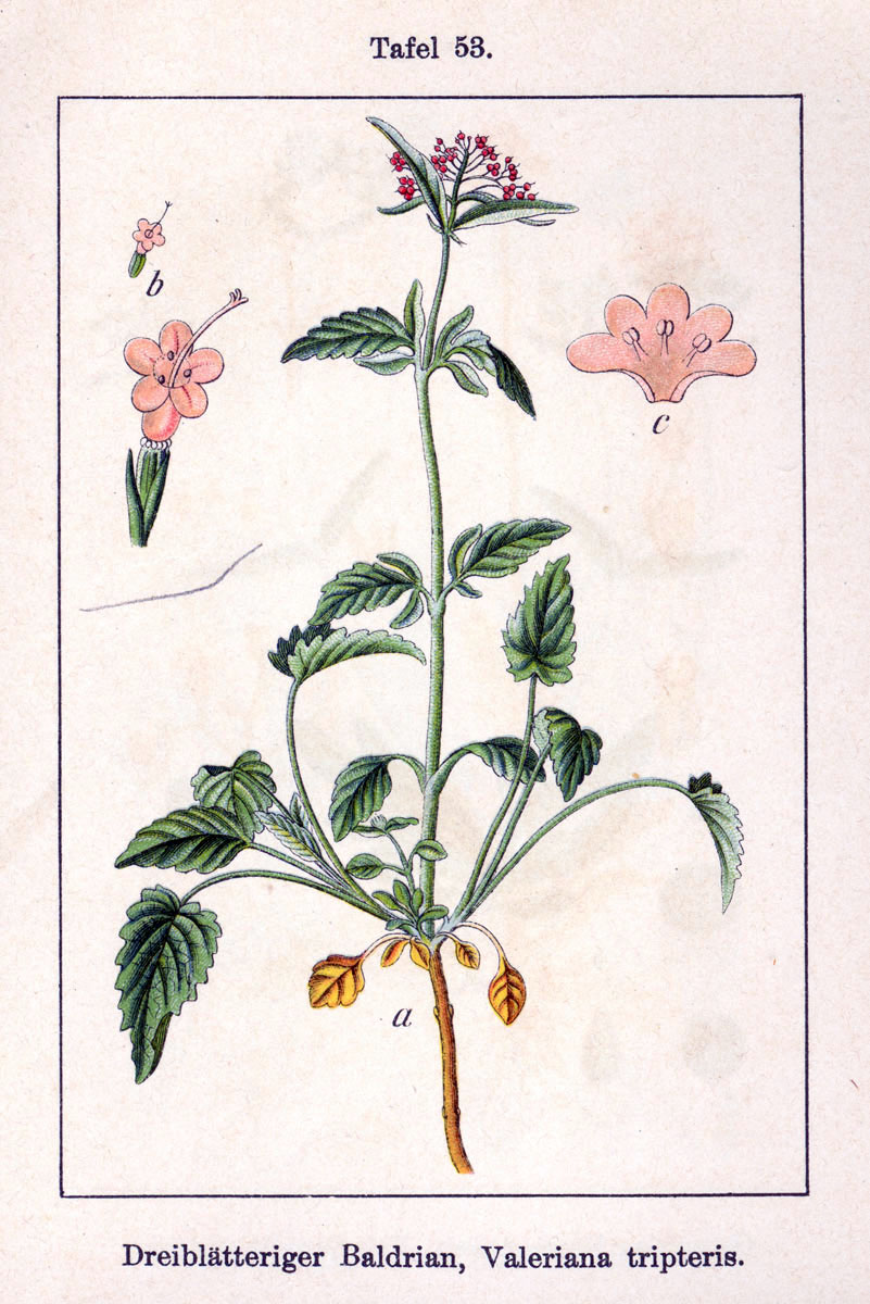 Valeriana tripteris L. Original Description Dreiblätteriger Baldrian, Valeriana tripteris